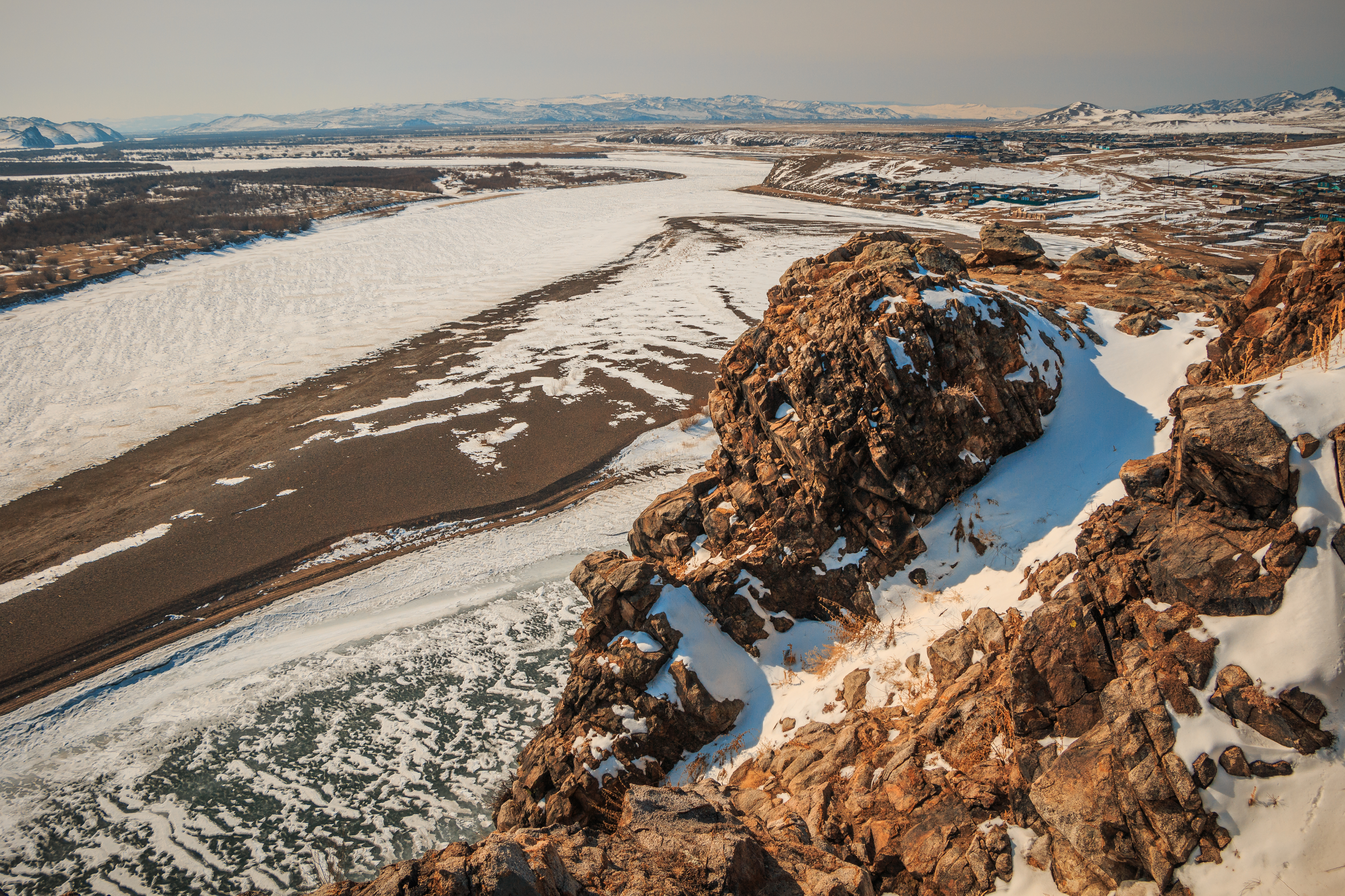 Скала Англичанка: Селенгинский район, Бурятия This image is related to the protected area of Russia number 0310109